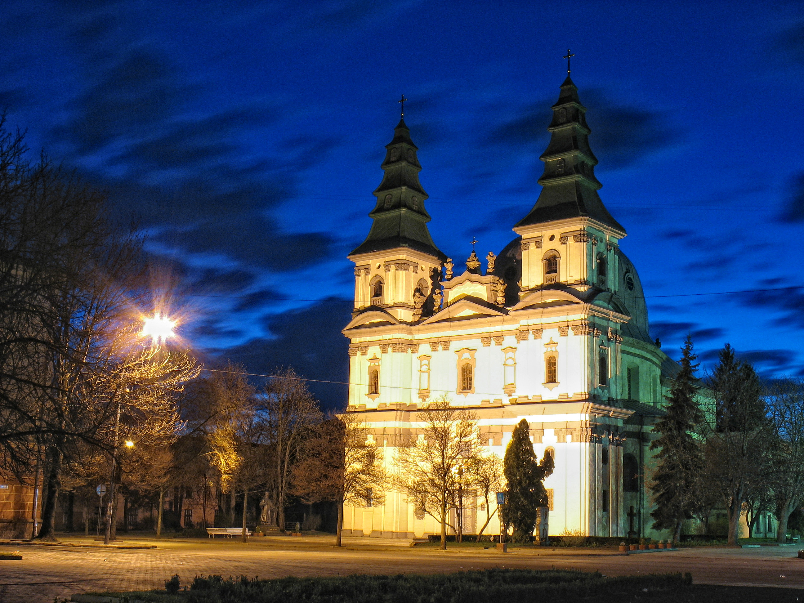 Тернопіль, Домініканський костел